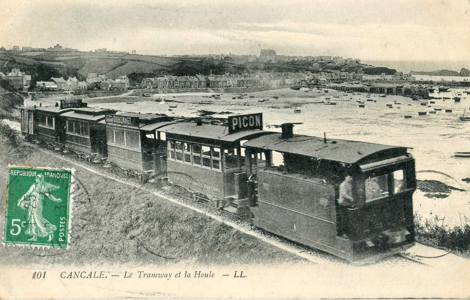 Carte postale ancienne éditée par LL, n°101CANCALE - Le Tramway et la Houle.Il s'agit d'une rame des Tramways bretons tractée par une locomotive à vapeur bicabine